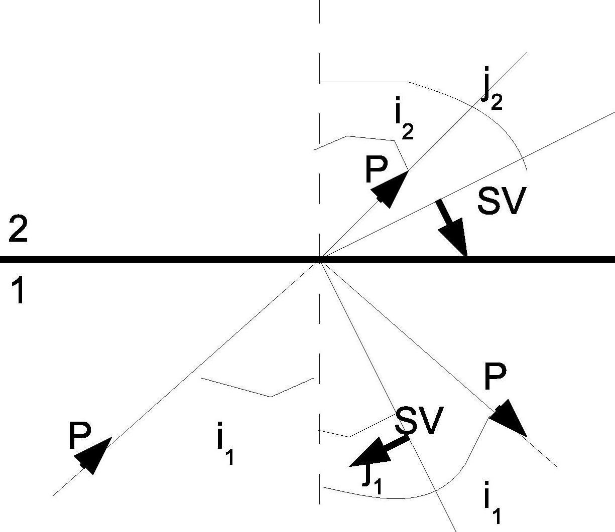 P-волна